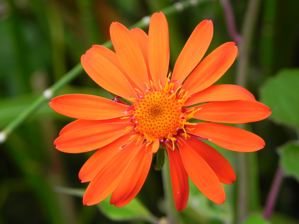 Flower of Bidens gardneri Baker - ASTERACEAE - Parque Olhos D´Água - Brasília - Distrito Federal - Brasil.